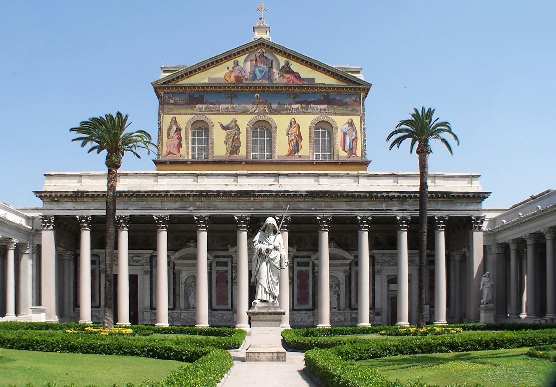 Rom, Sankt Paul vor den Mauern, San Paolo fuori le mura